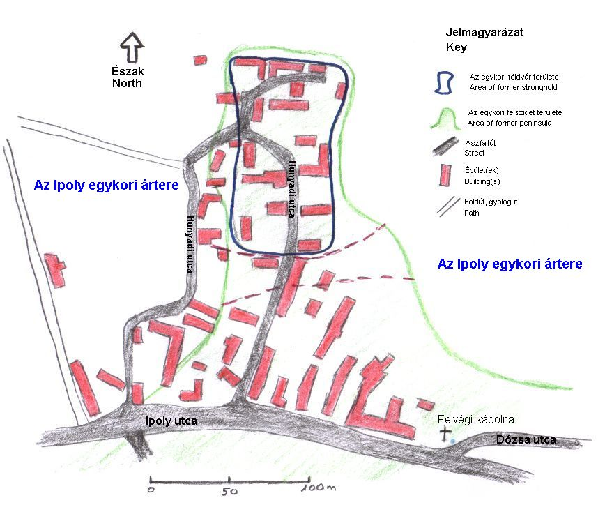 A honti földvár elhelyezkedése a falu egy részének térképén a jelenlegi épületek feltüntetésével